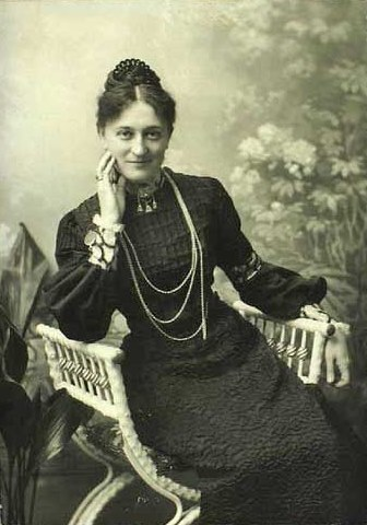 Agnes Charlotte Dagmar Adler, née Hansen (1865-1935), Danish pianist